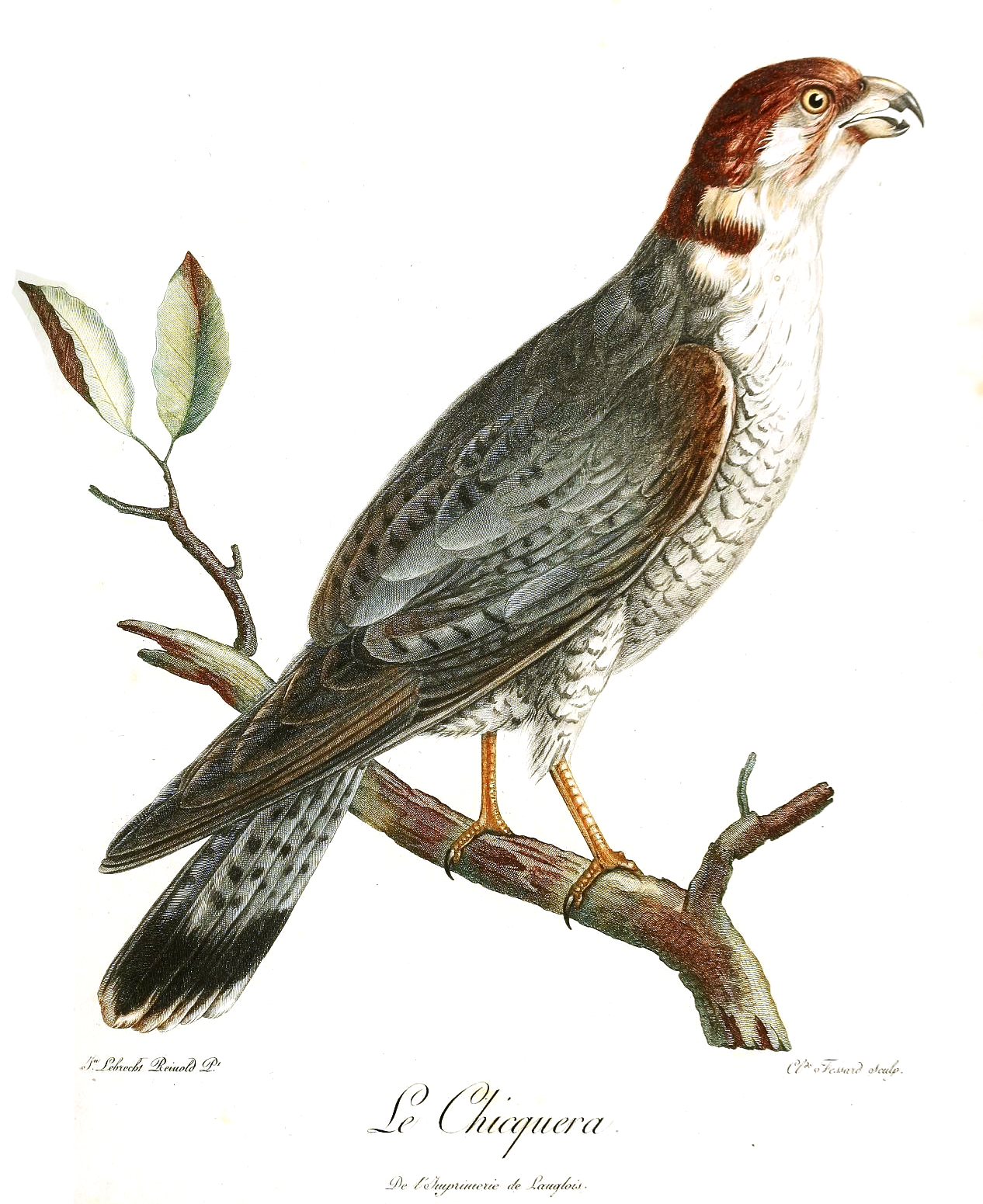 Le Chicquera, Falco chicquera from Francois Levaillant